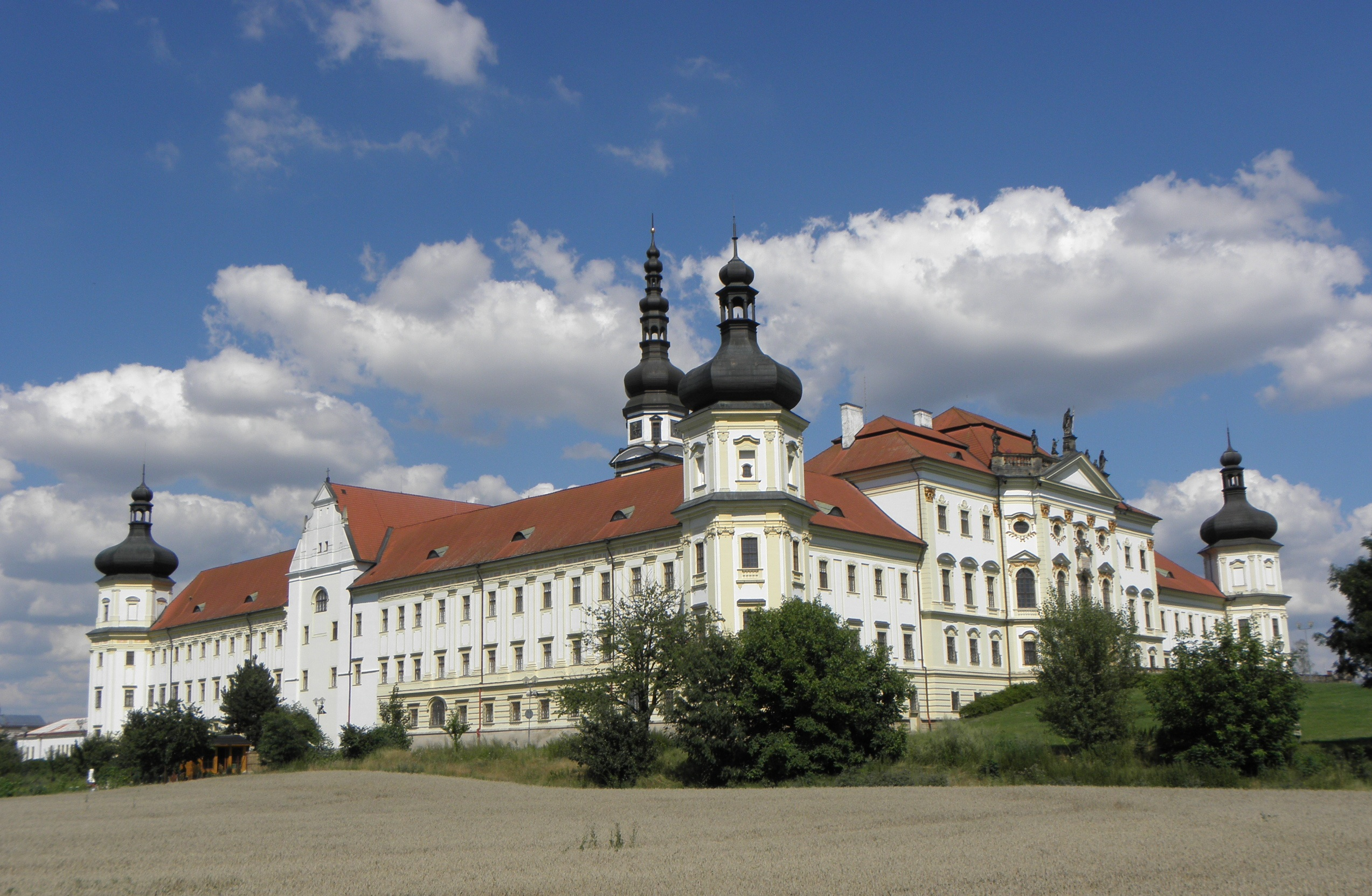 Klášter Hradisko Olomouc